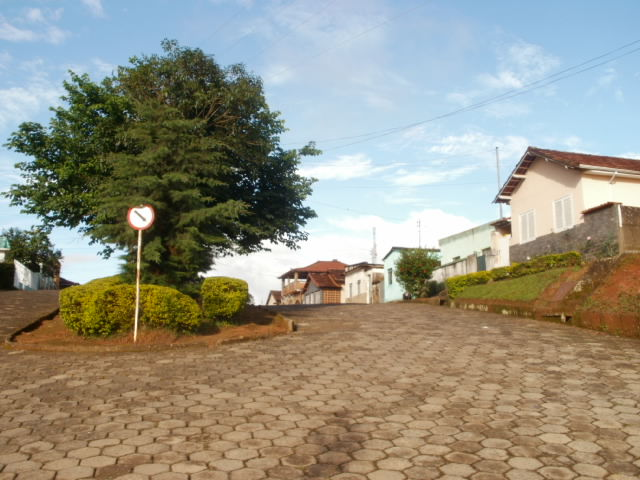 Vista de casas, vegetação e uma rua em São Vicente de Minas, Minas Gerais, Brasil.